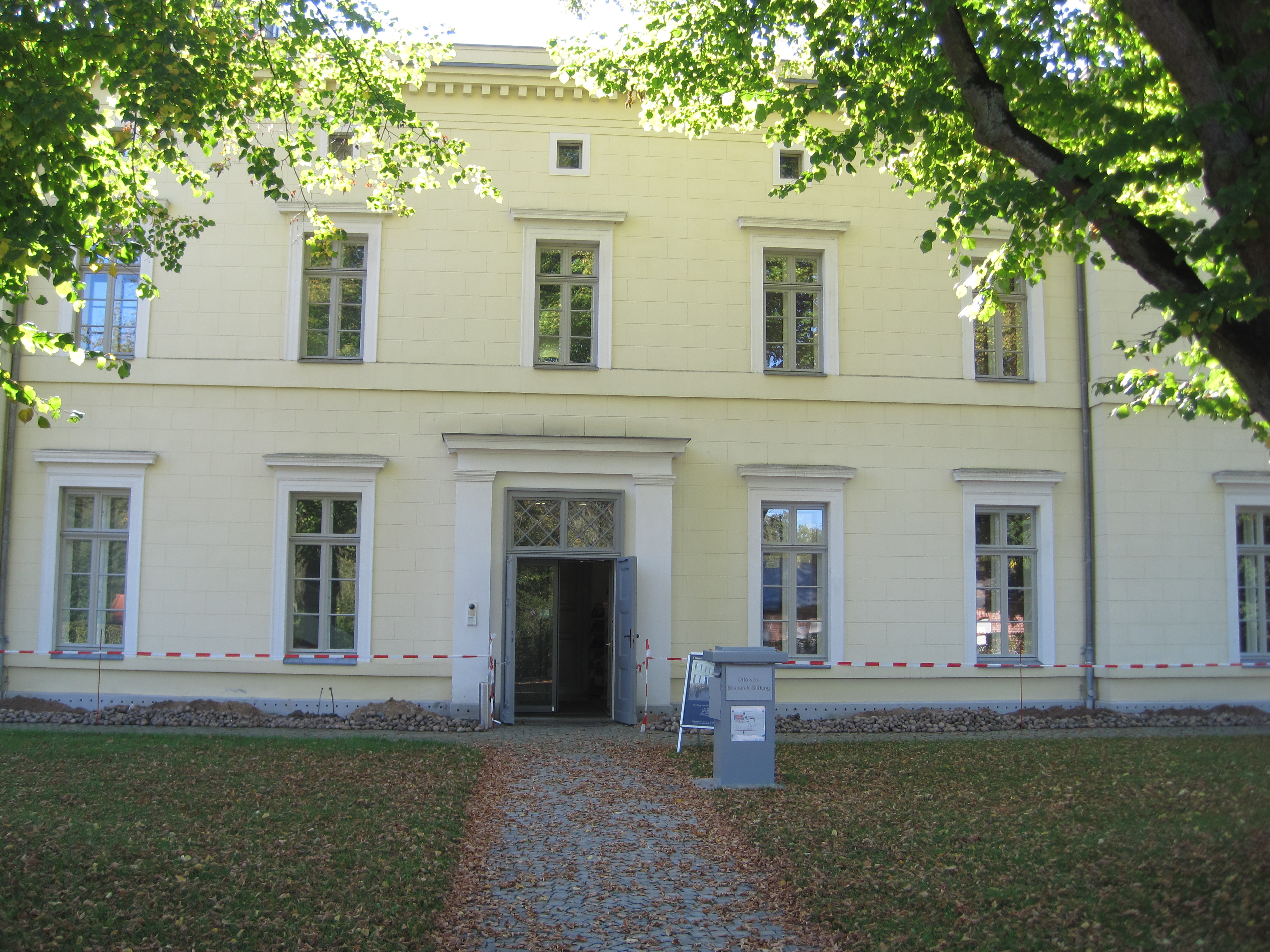 Eingang der Otto-von-Bismarck-Stiftung im ehem. Bahnhofsgebäude von Friedrichsruh